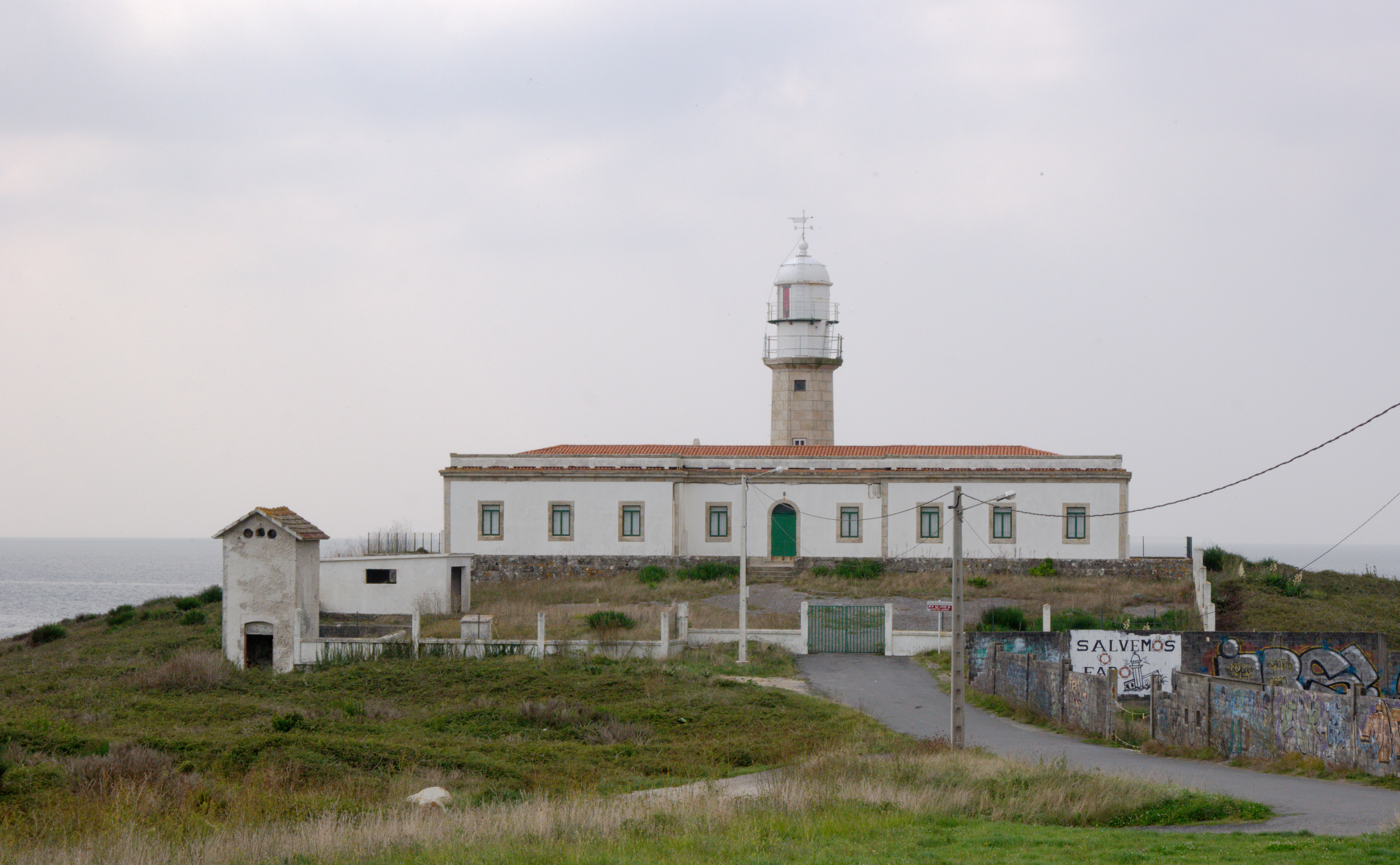 El faro de Lariño